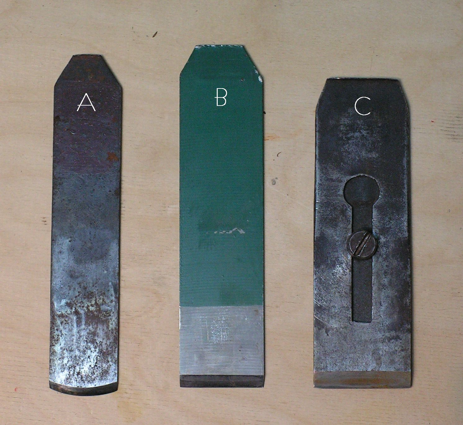 Ostrza strugów. A - zdzierak, B - równiak, C - gładzik (ostrze z nakładką)